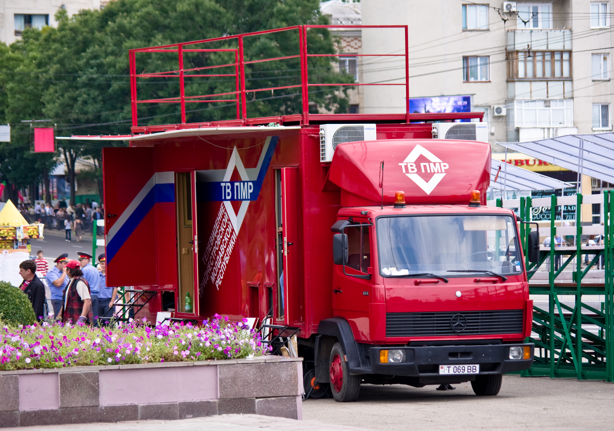 Машина телевидения ПМР на площади Суворова после парада (День независимости ПМР).